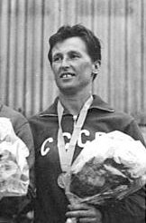 Zentralbild-Schaar-Wen-Qu. 28.7.1963 Elf Länder beim Europacup im Wasserspringen in Leipzig. Mit dem Kunstspringen der Männer wurde am 27.7.1963 in Leipzig der 1. Euopacup im Wasserspringen eröffnet, um den sich Aktive aus insgesamt Elf Ländern bewerben. Die vier Konkurrenzen werden auf den Sprunganlagen ausgetragen, die im Vorjahr bei den Europameisterschaften ihre große internationale Bewährungsprobe glänzend bestanden. UBz. Im Turmspringen der Frauen siegte die zweifache Olympiasiegerin und Europameisterin Ingrid Krämer (Mitte) vor Gabriele Schöpe (beide DDR) und der sowjetischen Vizeeuropameisterin Ninel Krutowa.